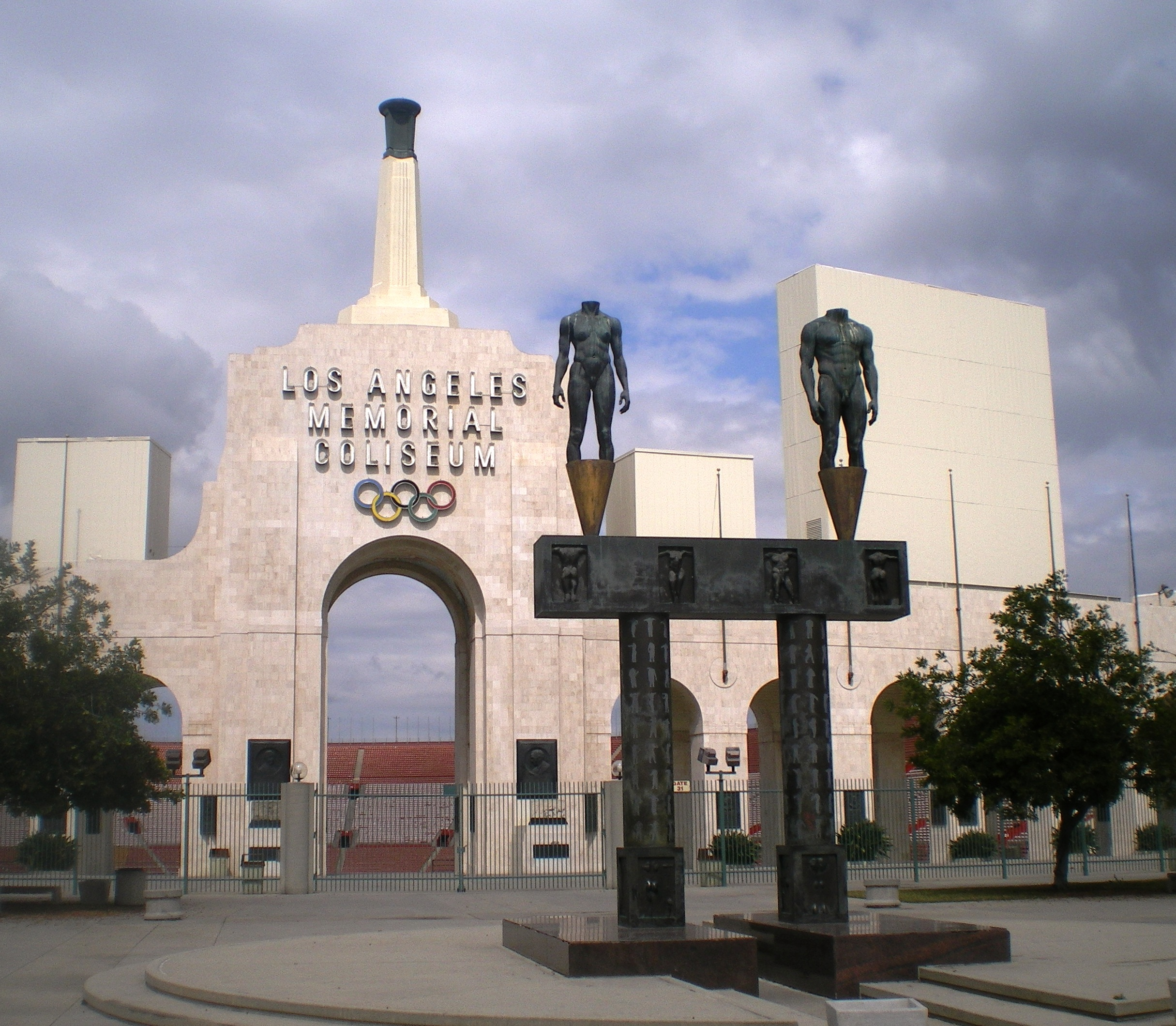 Los Angeles Memorial Coliseum (Entrance), 3911 S. Figueroa St., Los Angeles, California